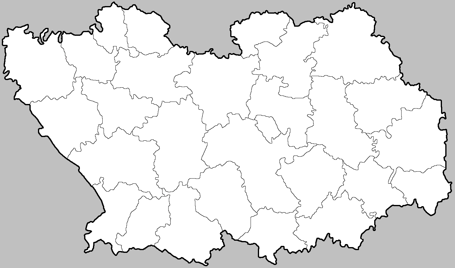 Позиционная карта Пензенской области